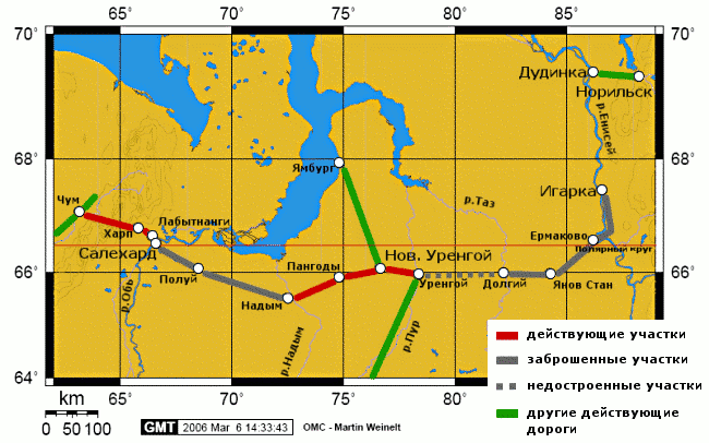 Схема Трансполярной ж/д магистрали и прилегающих железных дорог. Схема приблизительная, населённые пункты и другие географические объекты отмечены точно. Проекция Меркатора.